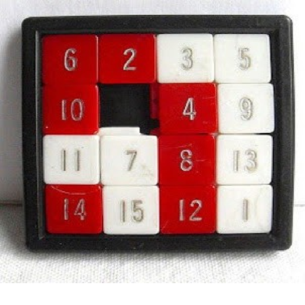 el propósito en este juego es deslizar las piezas para acomodar los números del 1 al 16